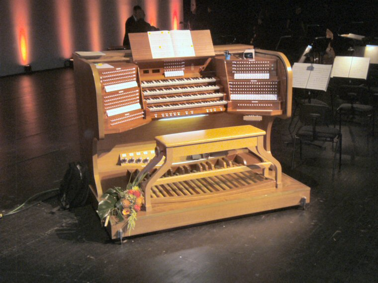 Spieltisch Rhein-Mosel-Halle Koblenz